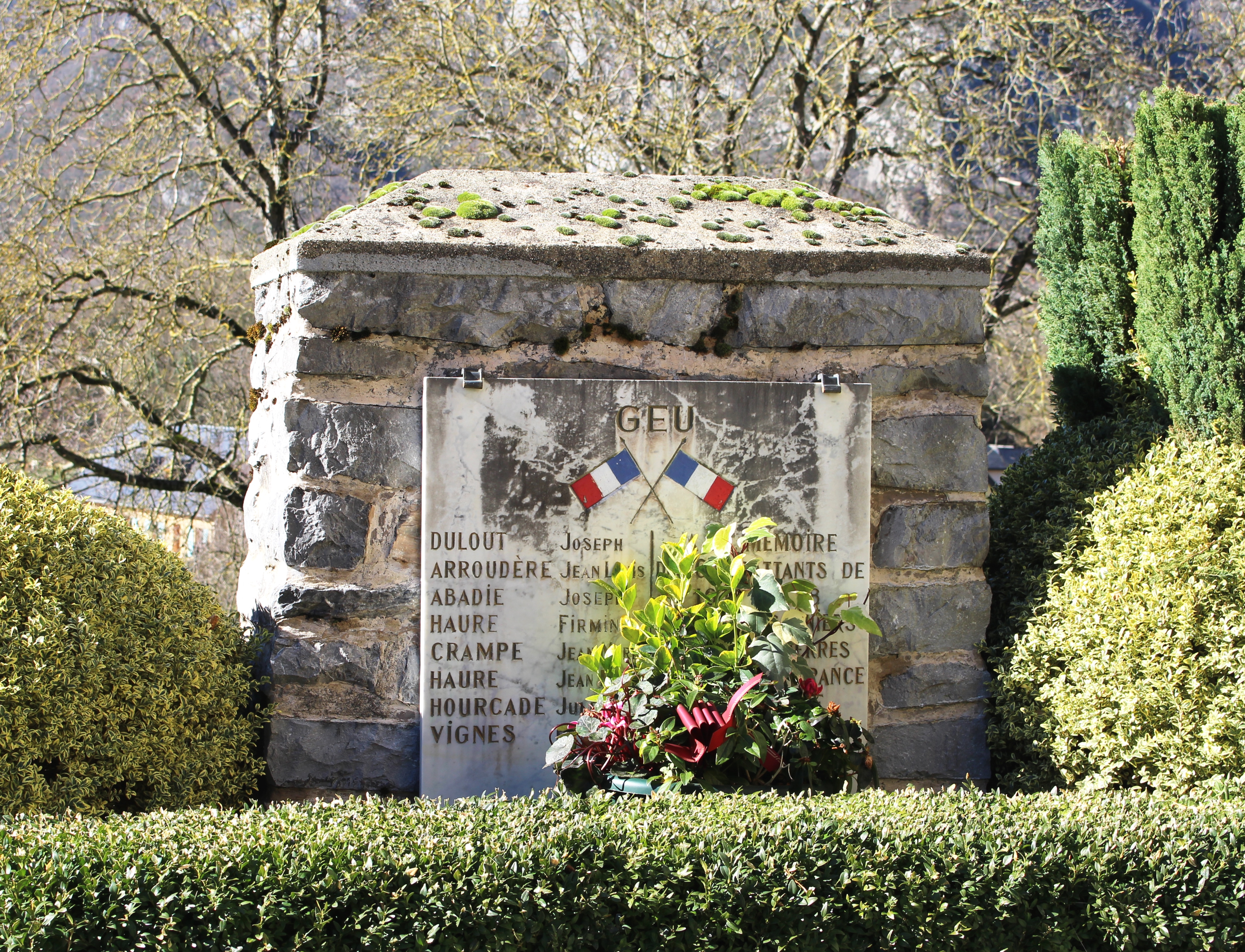 Monument aux morts de Geu (Hautes-Pyrénées)